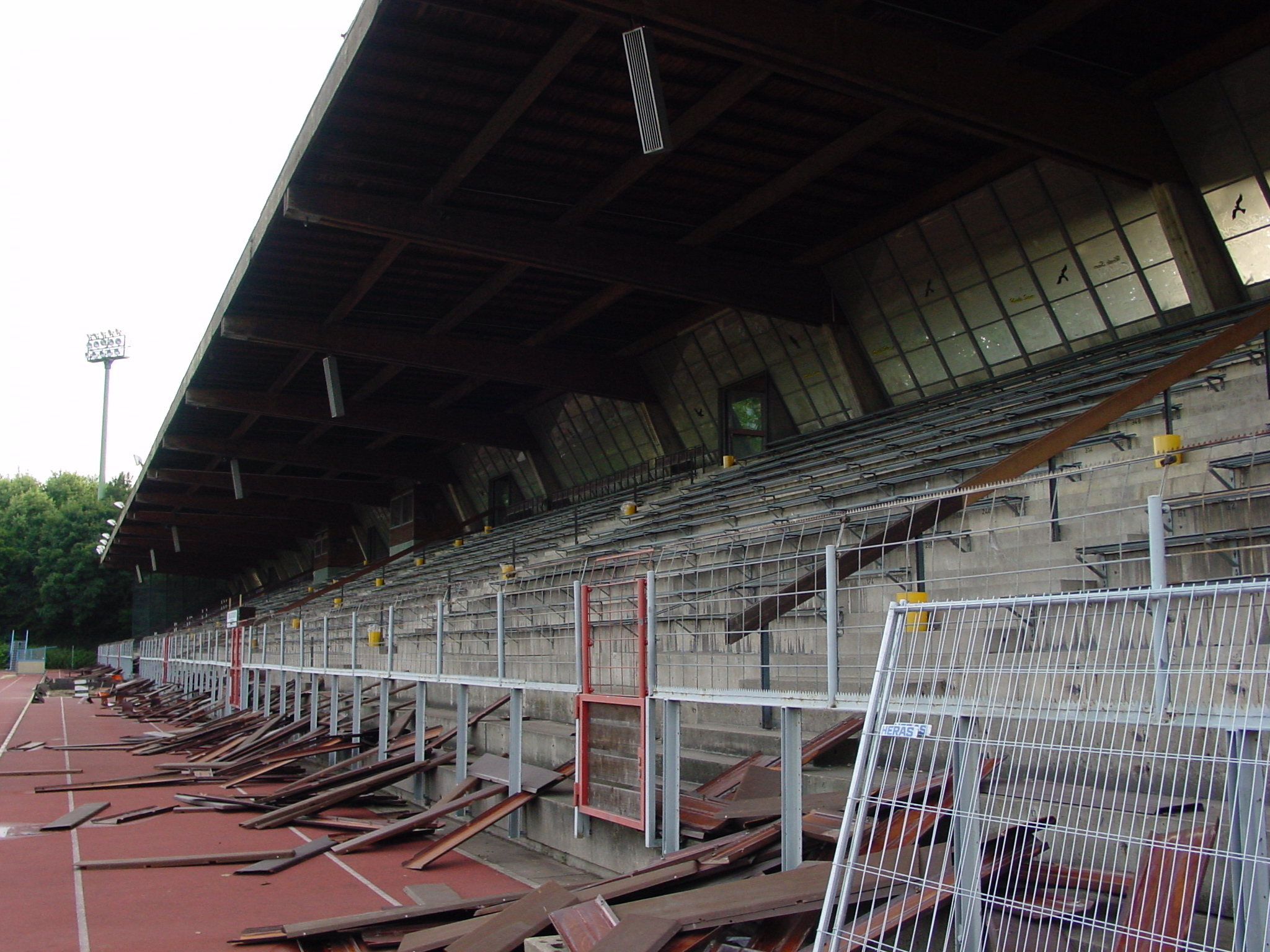 Grugastadion, Essen-Rüttenscheid während des Abrisses